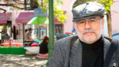 Enrique Sealtiel Alatriste y Lozano, escritor, editor, diplomático y promotor cultural.